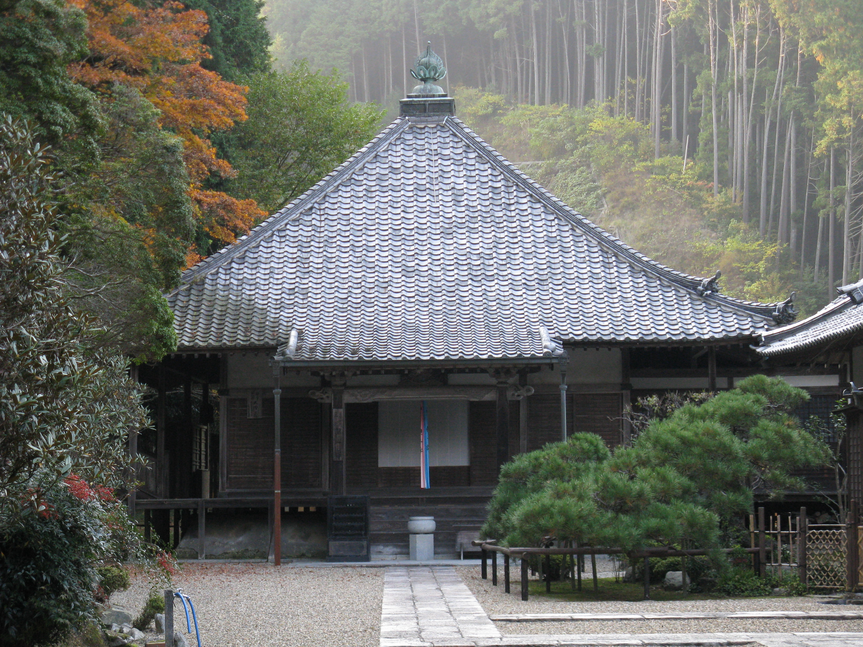 地蔵寺 願王殿